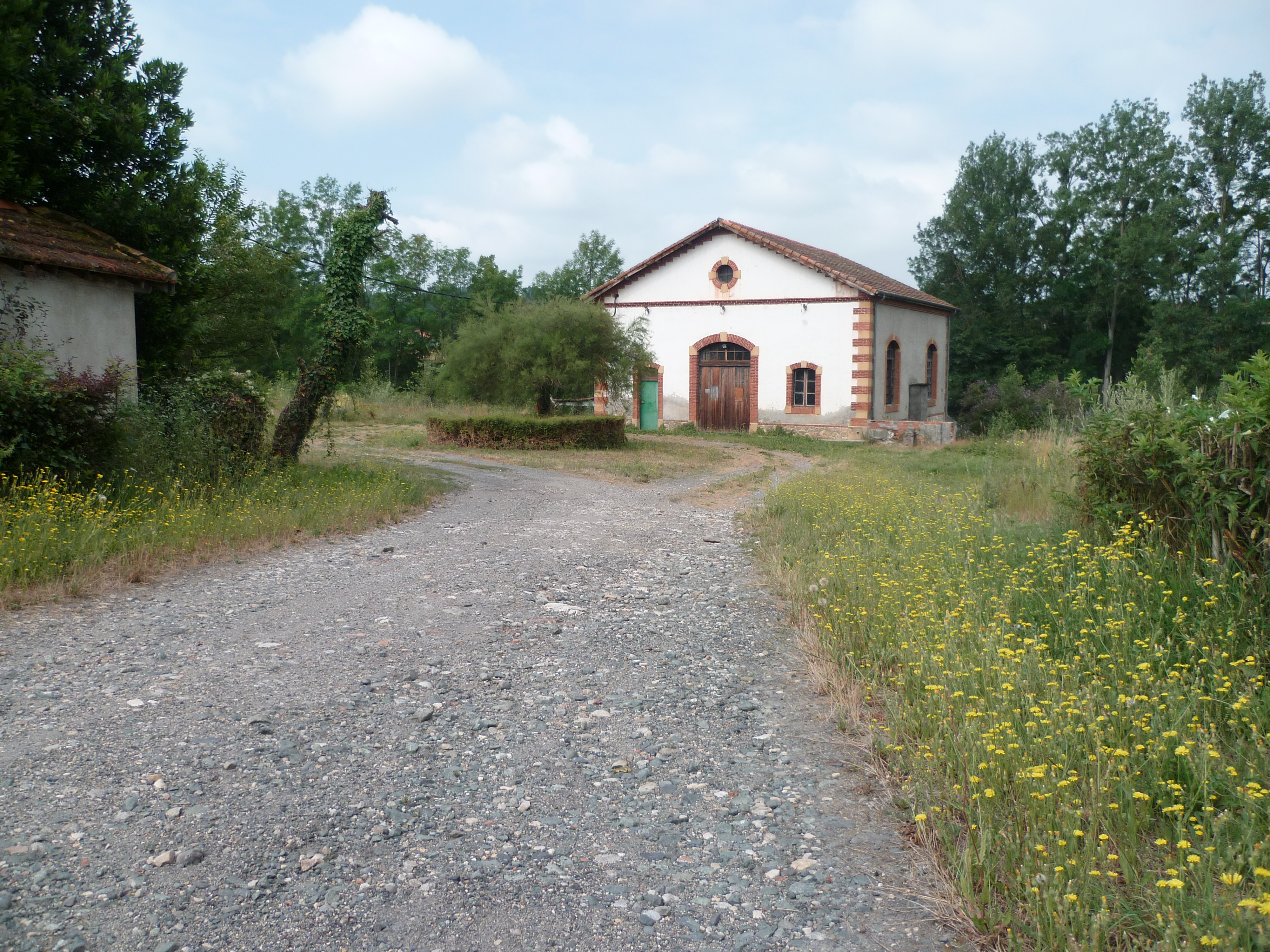 Usine hydroélectrique sur le Salat à Cassagne, Haute-Garonne.